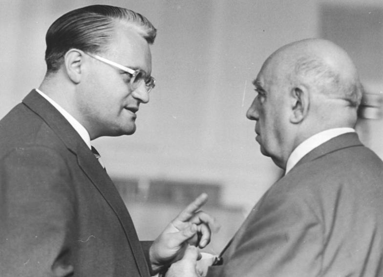 Oberstes Gericht, Globke-Prozess, Gerald Götting Zentralbild Brüggmann Stöhr-8.7.1963 Globke-Prozess eröffnet. Vor dem 1. Strafsenat des Obersten Gerichts der DDR begann am 8. Juli 1963 der von der internationalen Öffentlichkeit mit großer Spannung erwartete Prozess gegen den langjährigen leitenden Mitarbeiter des faschistischen Reichsinnenministeriums und derzeitigen Bonner Staatssekretär Dr. Hans Globke. UBz: Der Stellvertreter des Vorsitzenden des Staatsrates der DDR Gerald Götting (links) im Gespräch mit Abbé Boulier (Frankreich).